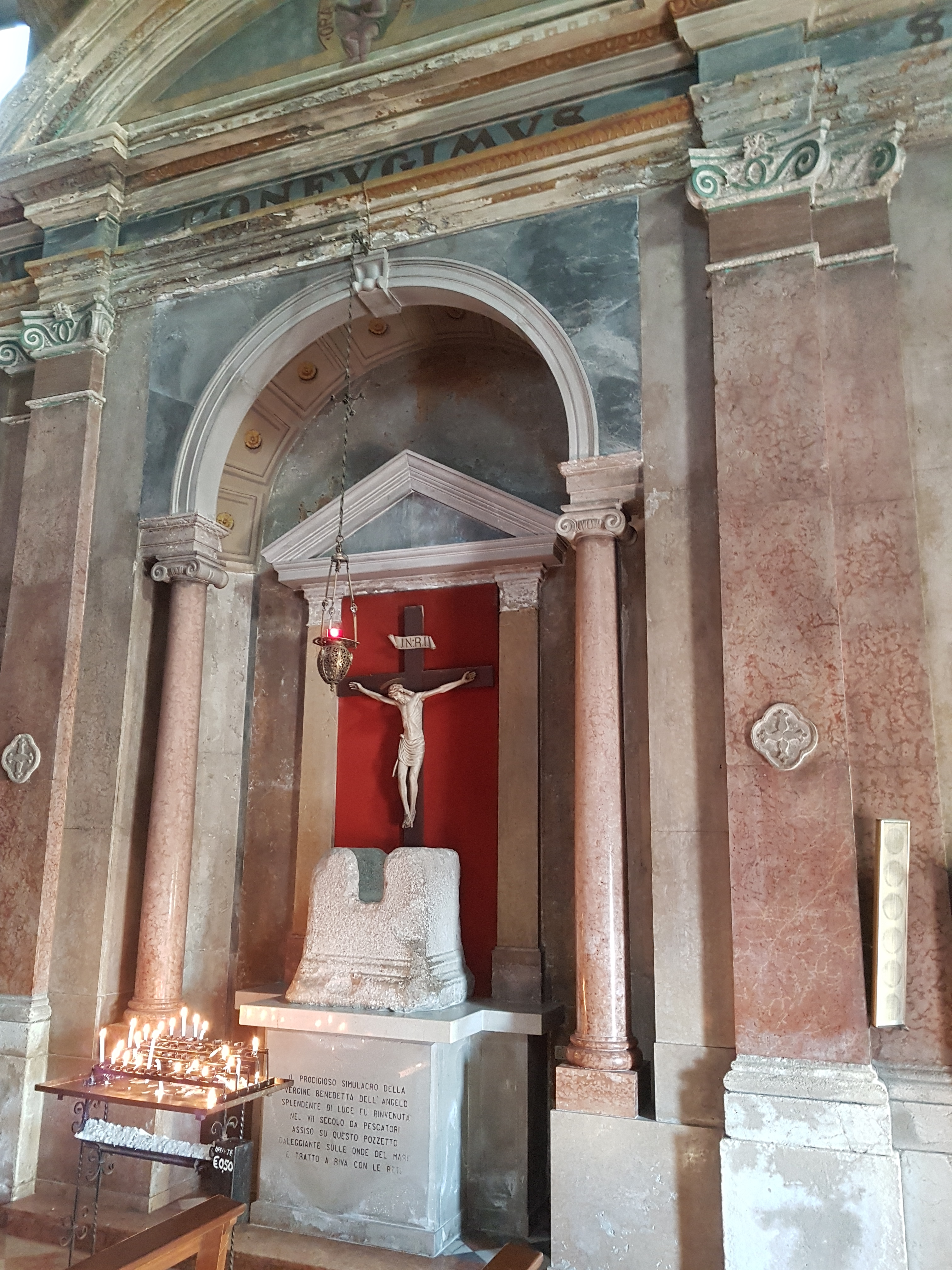 Santuario della Madonna dell'Angelo (Caorle)